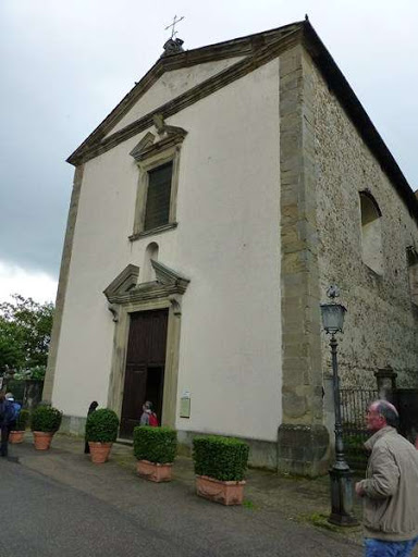 Propositura, facciata